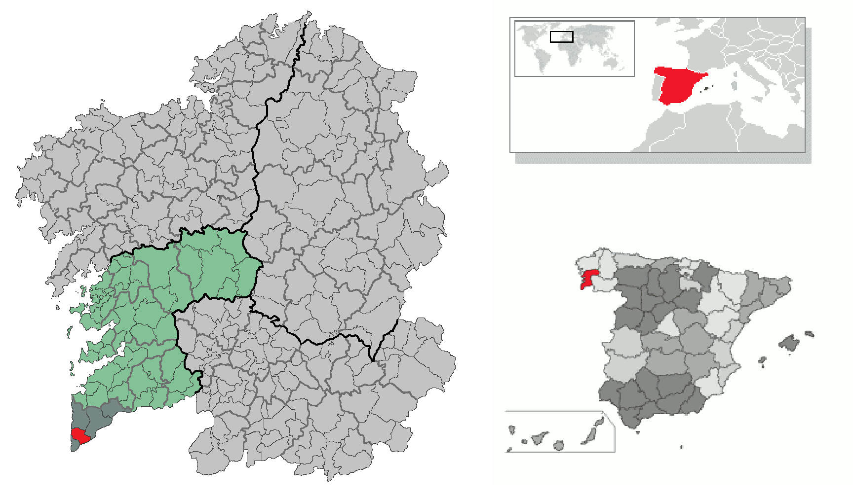 Localización del municipio de O Rosal respecto a la provincia de Pontevedra y a la comunidad autónoma de Galicia, España y Europa